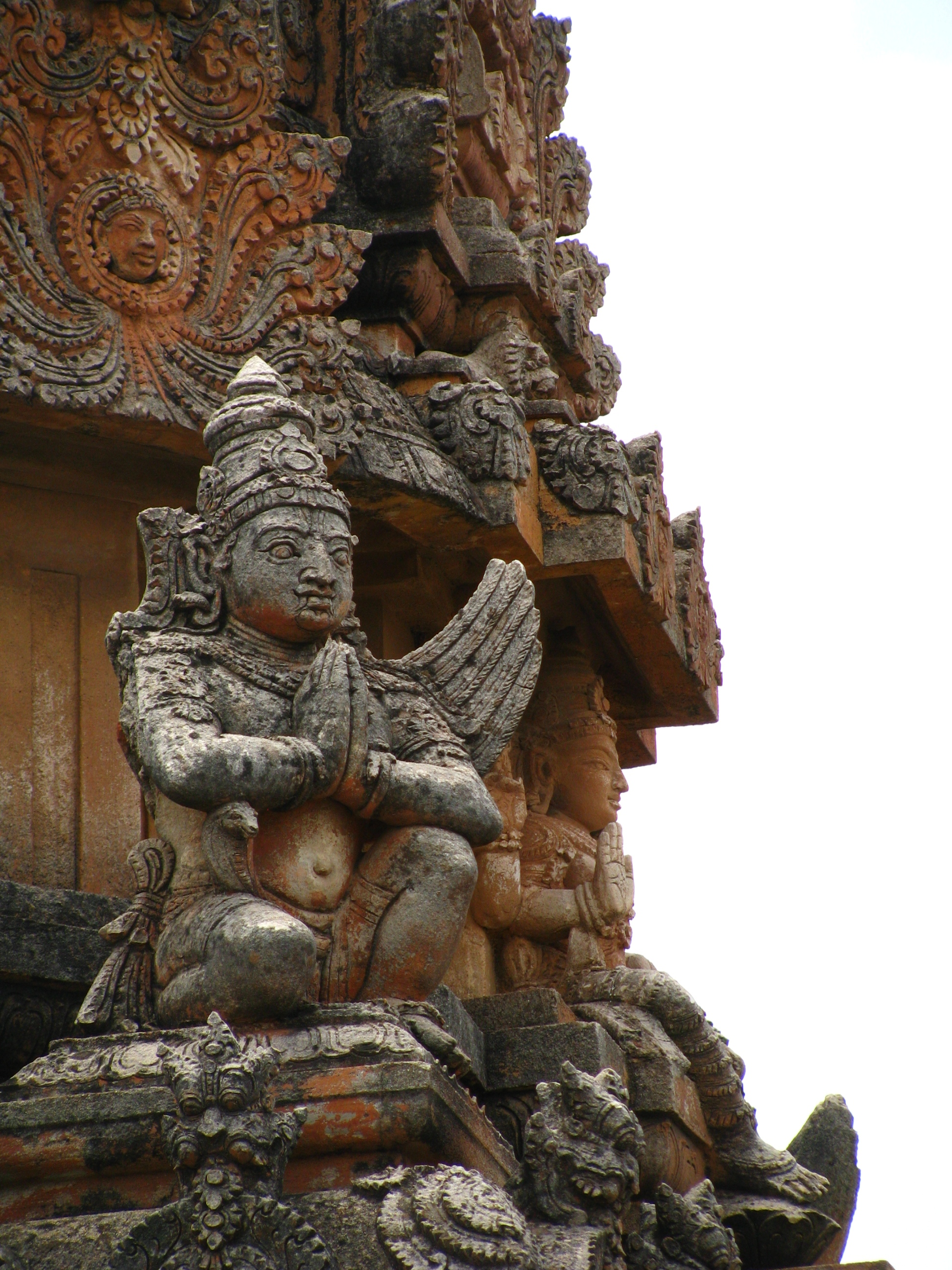 Garuda carving on temple in Hampi, India